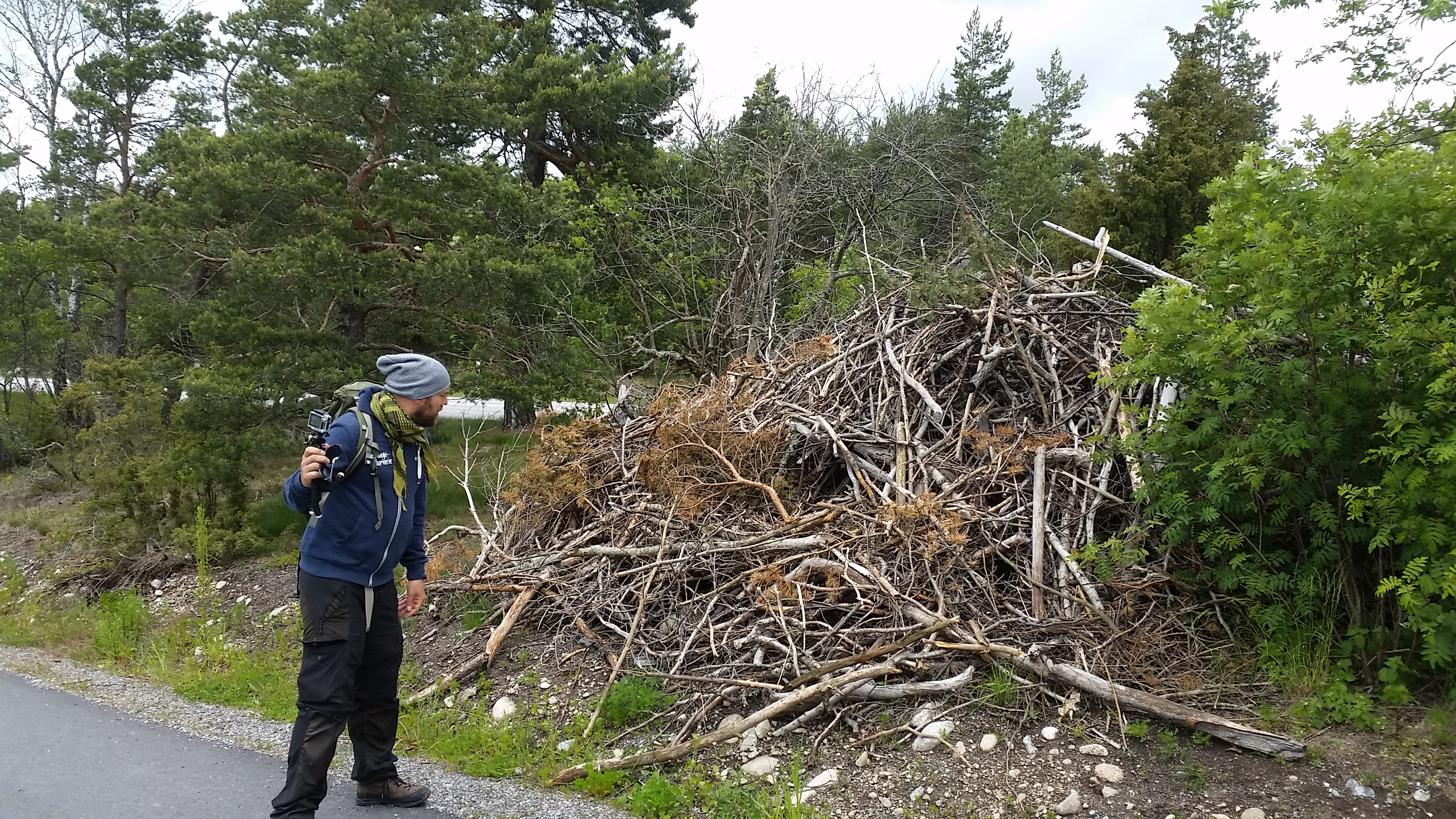 Stiko Per Larsson passerar Fantans hög på vägen från Ekerö och in till Stockholm under vandringsturnen 2015.